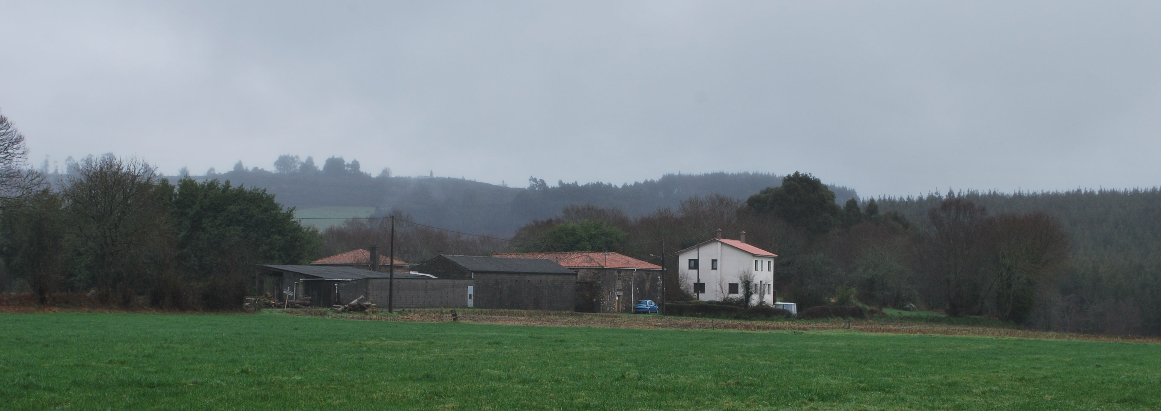 Vista da Casanova en Fisteus, Curtis A Coruña, Galiza Spain